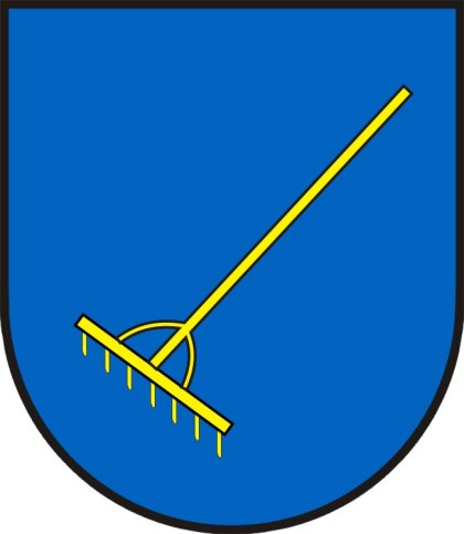 Grabie w herbie Strzebiń